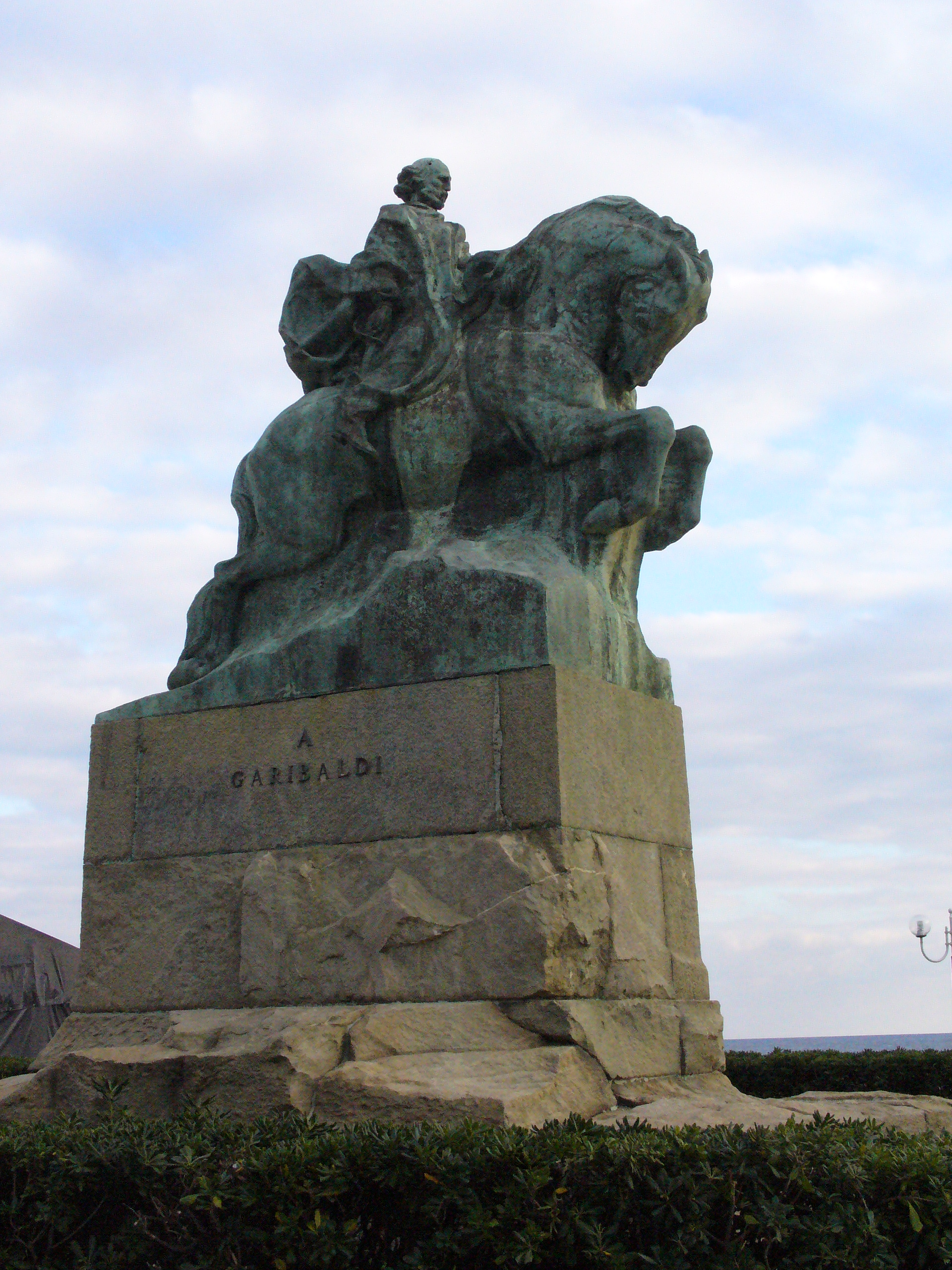 Il monumento a Giuseppe Garibaldi, opera di Leonardo Bistolfi, nei giardini del Prolungamento a Savona. - Savona - Provincia di Savona / Liguria (Italy)